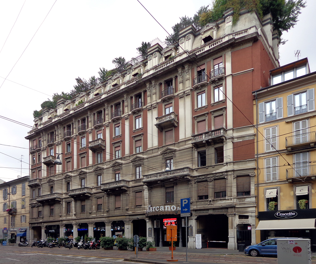 Milano, edificio residenziale in corso di Porta Romana 63-67, che ospita anche il teatro Carcano.